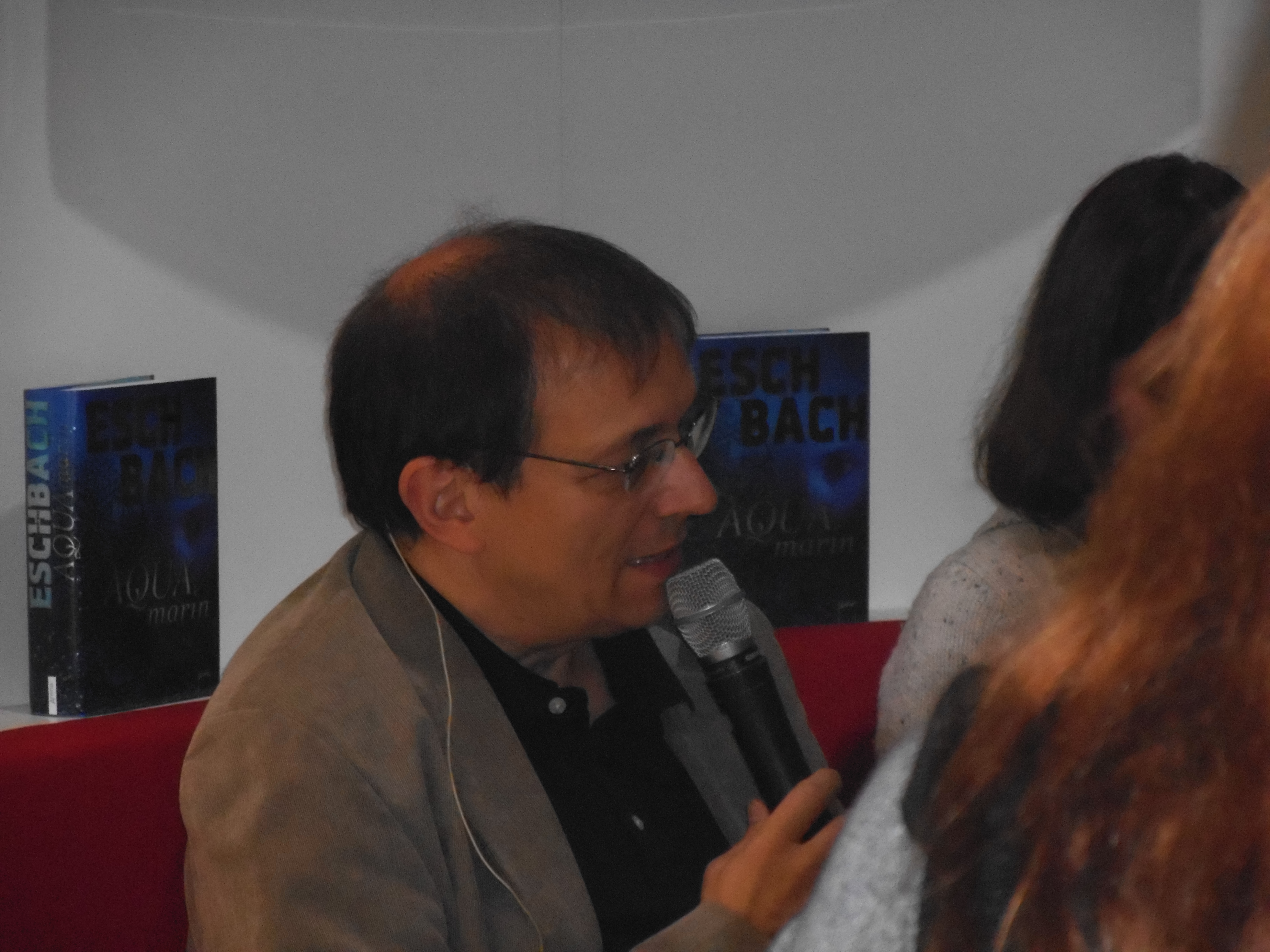 Andreas Eschbach auf der Frankfurter Buchmesse am 16. Oktober 2015, aus seinem neuen Roman "Aquamarin" lesend und bei einer Fragestunde Baden-Württemberger Schüler.